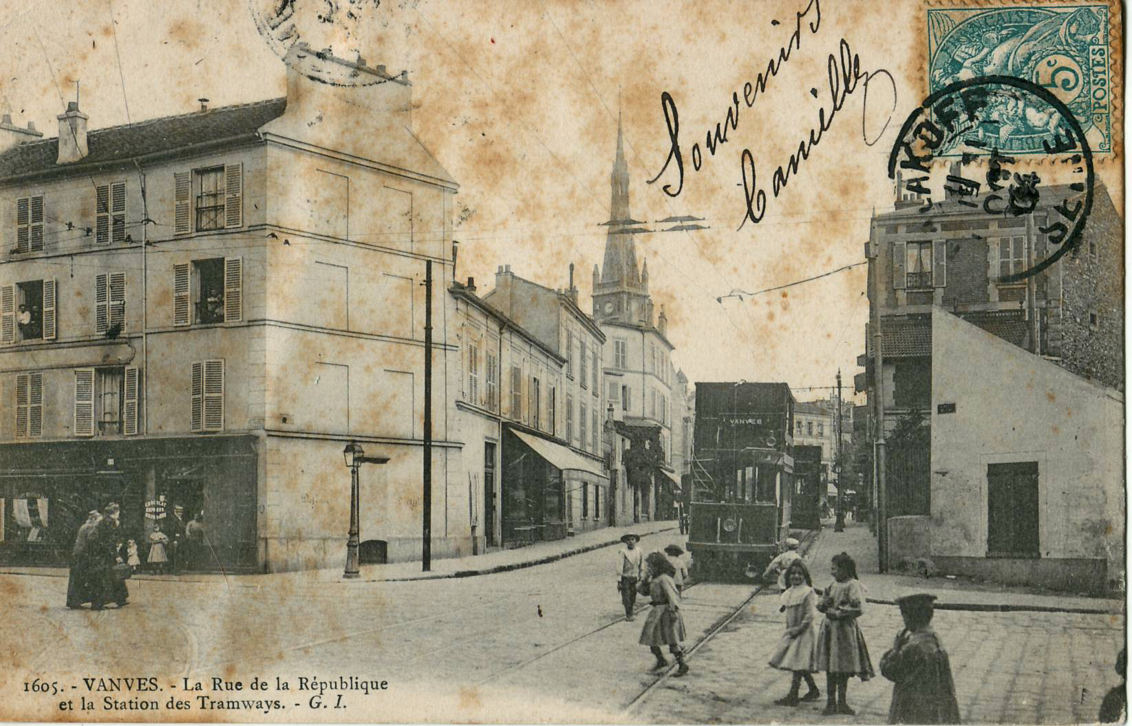 Carte postale ancienne éditée par GI, n°1605 : VANVES : La Rue de la République et la Station des Tramways